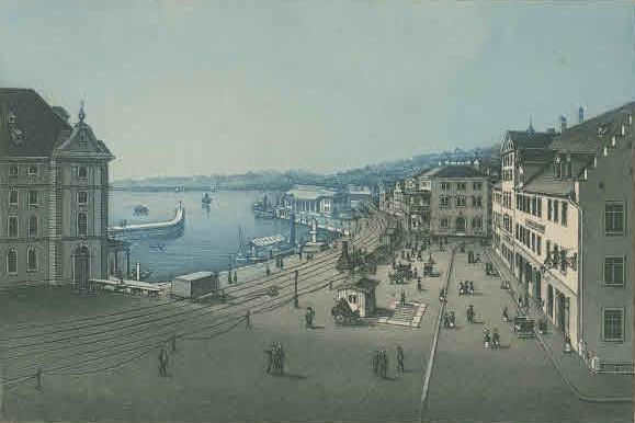 Rorschach: Hafen mit Hafenbahnhof am Morgen, Kornhausplatz mit Güterwaage und Häuschen, Parallelgeleise der Nordostbahn NOB und der Vereinigten Schweizerbahnen VSB